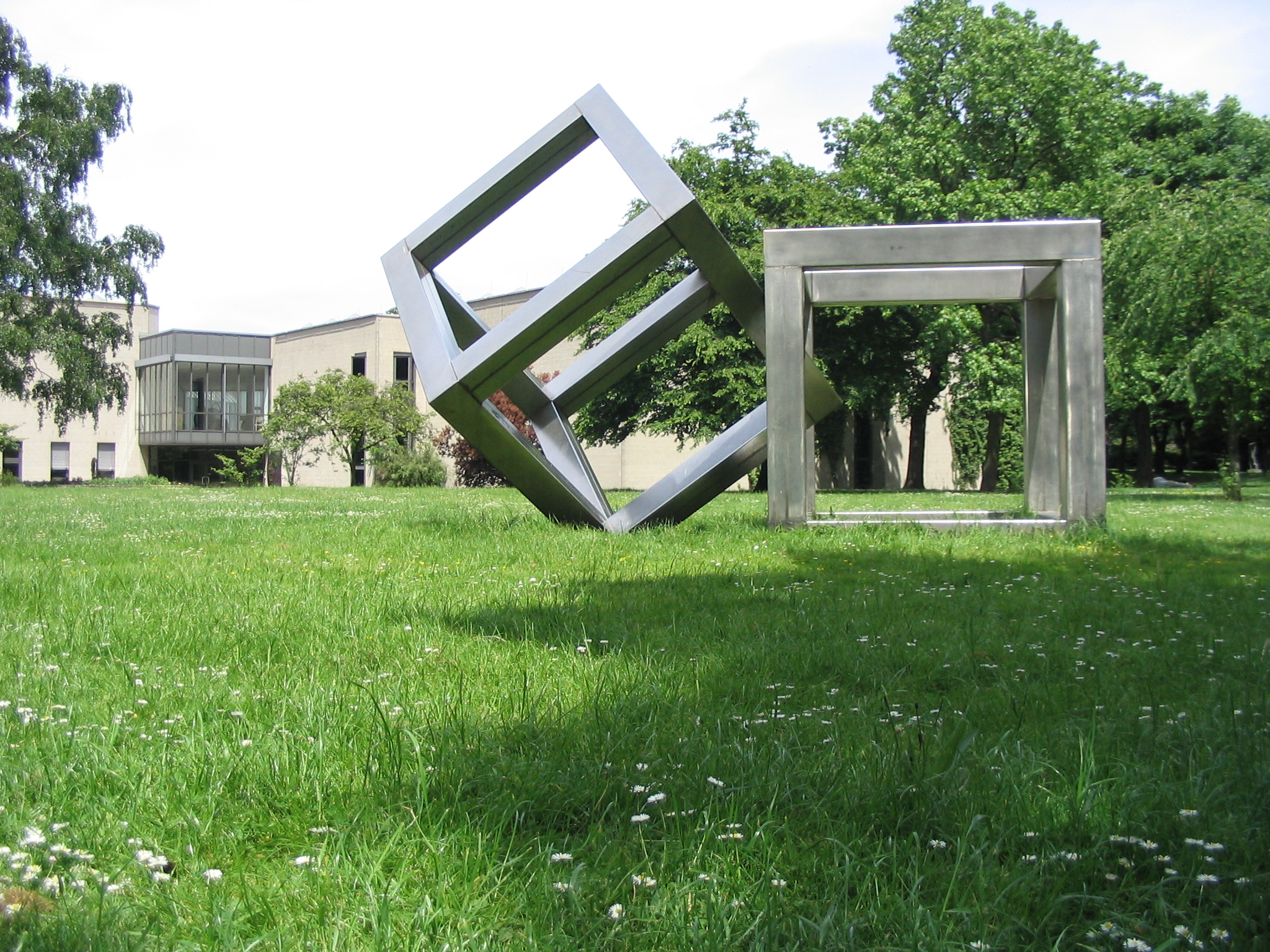 Im Kantpark (mit Lehmbruckmuseum im Hintergrund) Sculptuur "3" (1973) by Alf Lechner in Duisburg/Germany